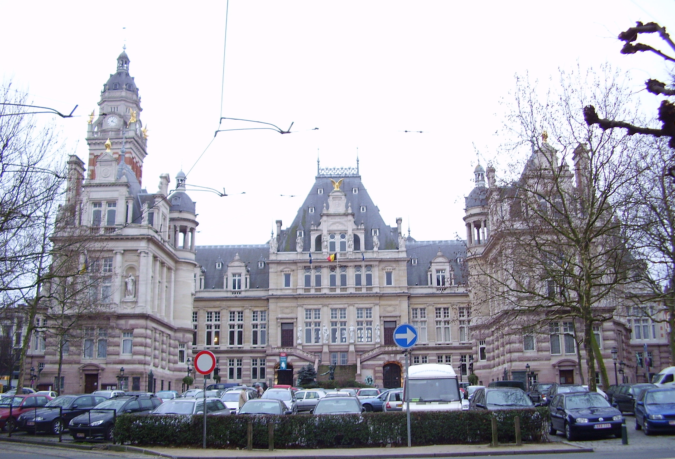 Maison communale de Saint-Gilles, Bruxelles